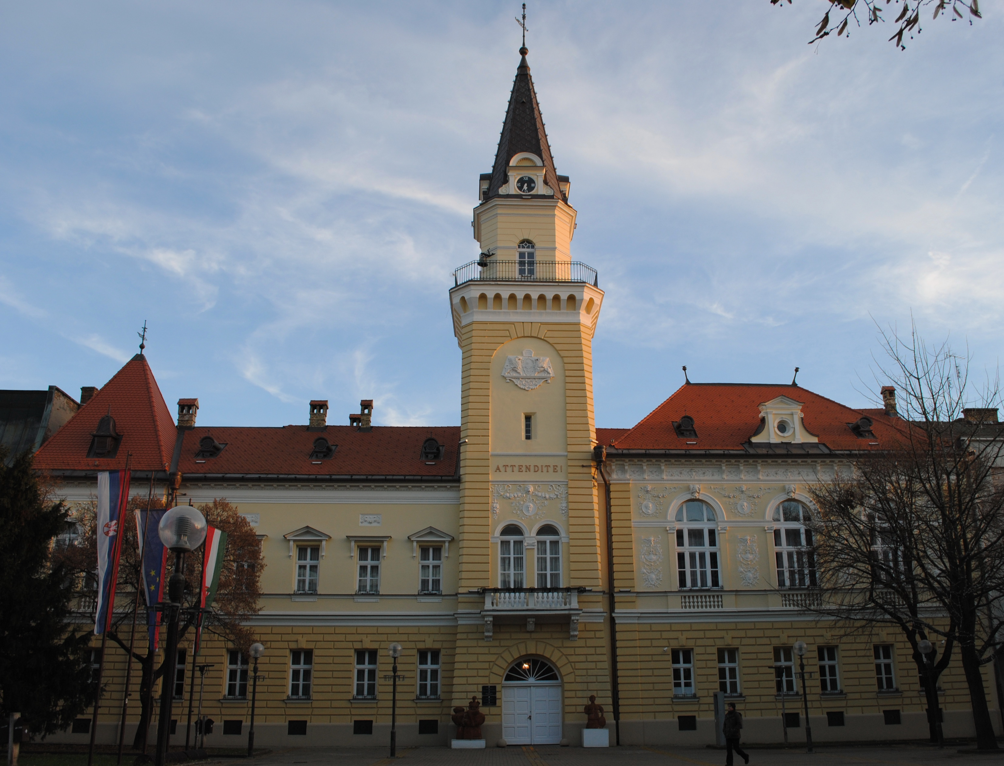 Srpski (latinica): Zgrada Skupštine opštine Kikinda, Prostorno kulturno istorijska celina 62